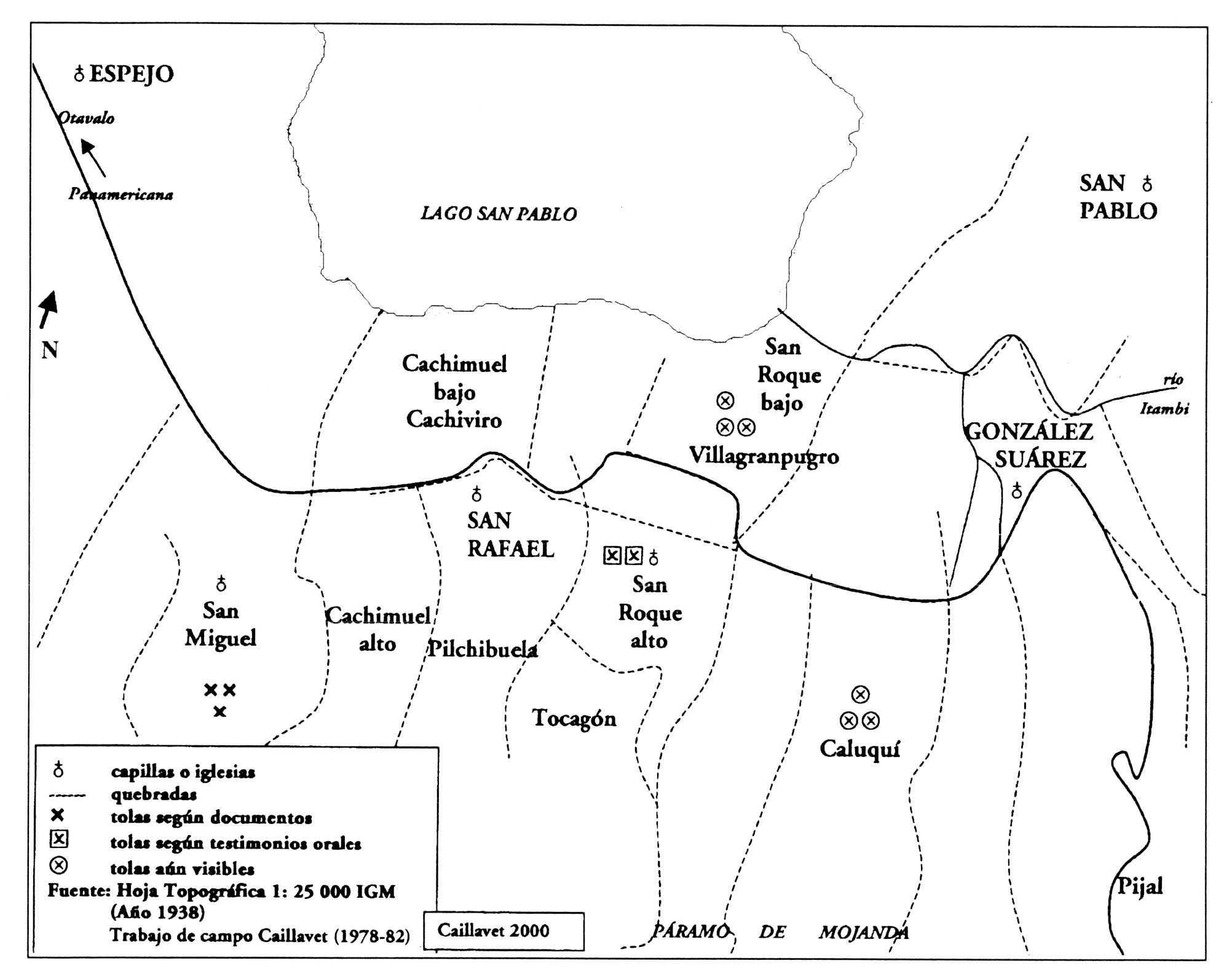 Aqui se pueden ver los territorios y dominios de diferentes caciquez en el territorio ancestral de Otavalo.